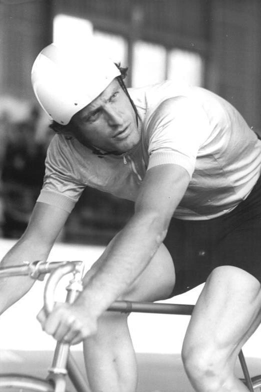 Norbert Dürpisch ADN-ZB Kluge 7.7.77-str-Leipzig: DDR-Meisterschaften im Bahnradsport - Norbert Dürpisch vom ADK Vorwärts Frankfurt wurde am 6.7. auf der Leipziger Alfred-Rosch-Kampfbahn neuer Meister im 4 000-m-Einzelverfoglungsfahren in 4:50,47 min. Er verteidigte seinen im Vorjahr errungenen Titel klar gegen den Berliner Uwe Unterwalder, der im Halbfinale mit 4:45,81 min. eine neue Weltbestzeit für Zementbahnen gefahren war.